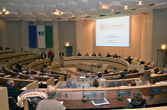 Amassada generau deu Congrès